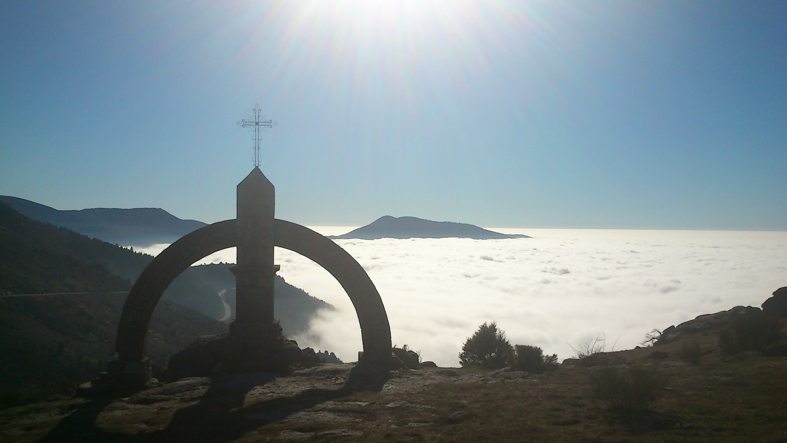 Mar de Nubes